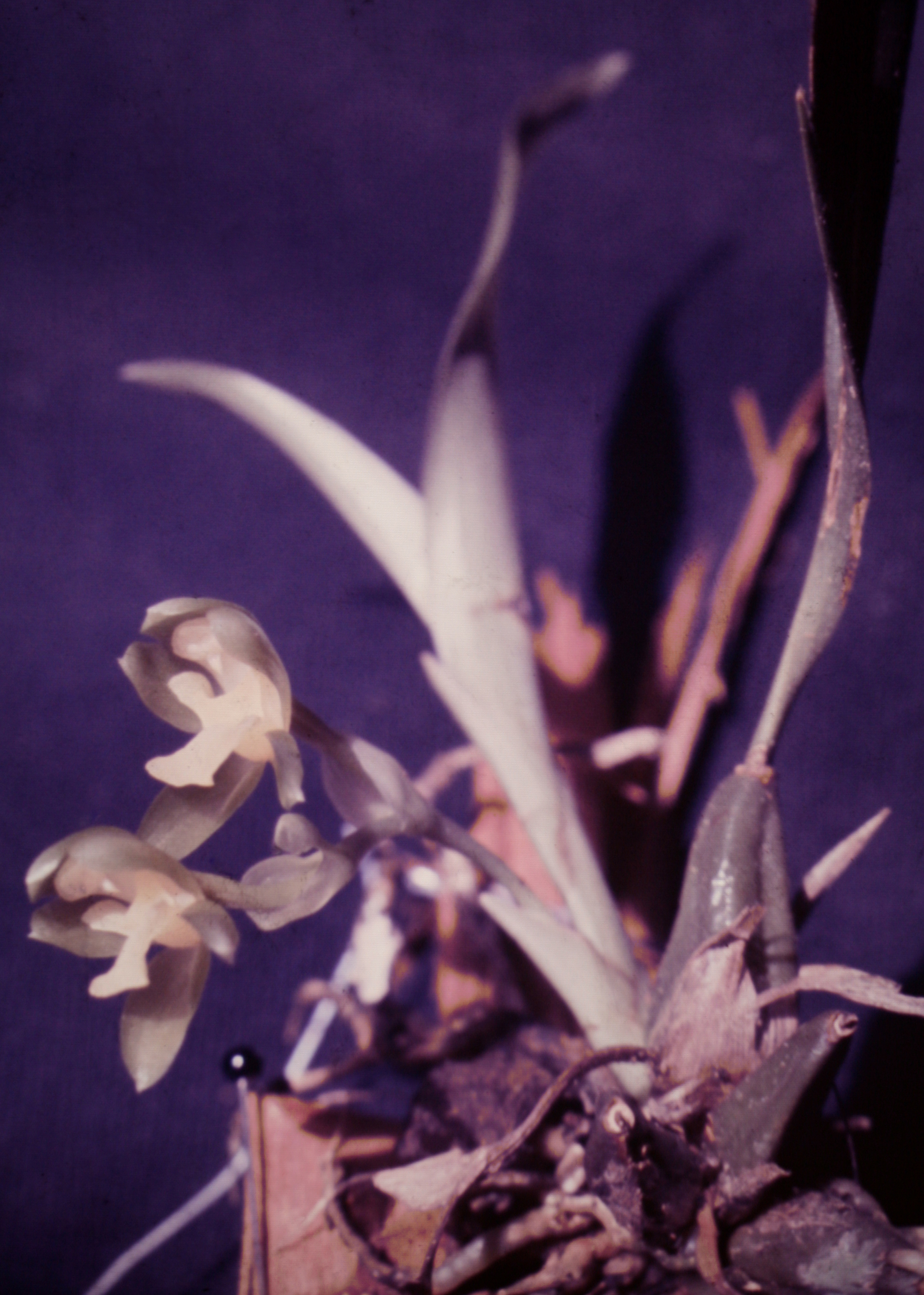 Batemannia armillata , Suriname.